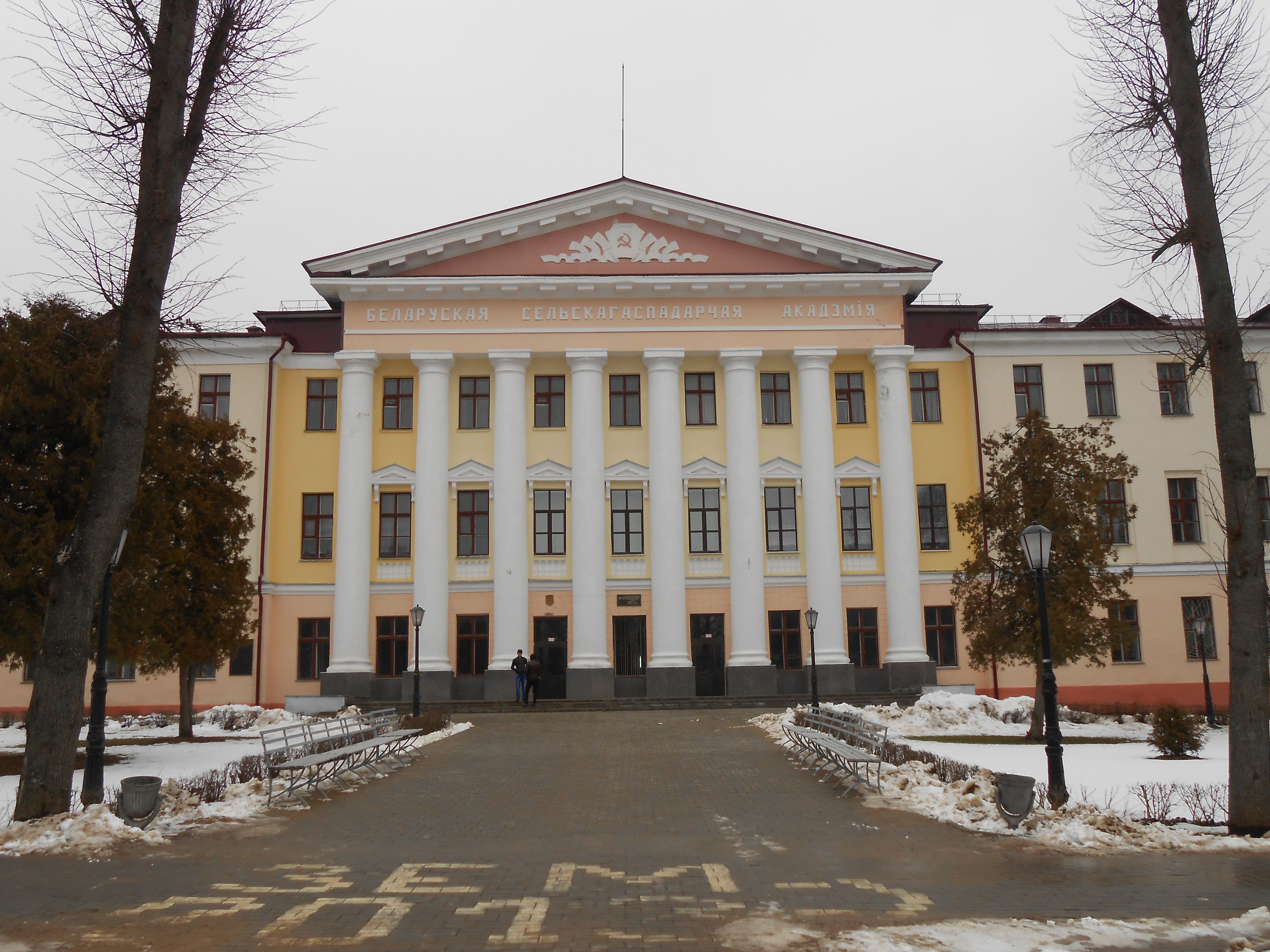 Hauptgebäude der Weißrussischen staatlichen landwirtschaftlichen Akademie in Horki, Republik Belarus, im Februar 2014.